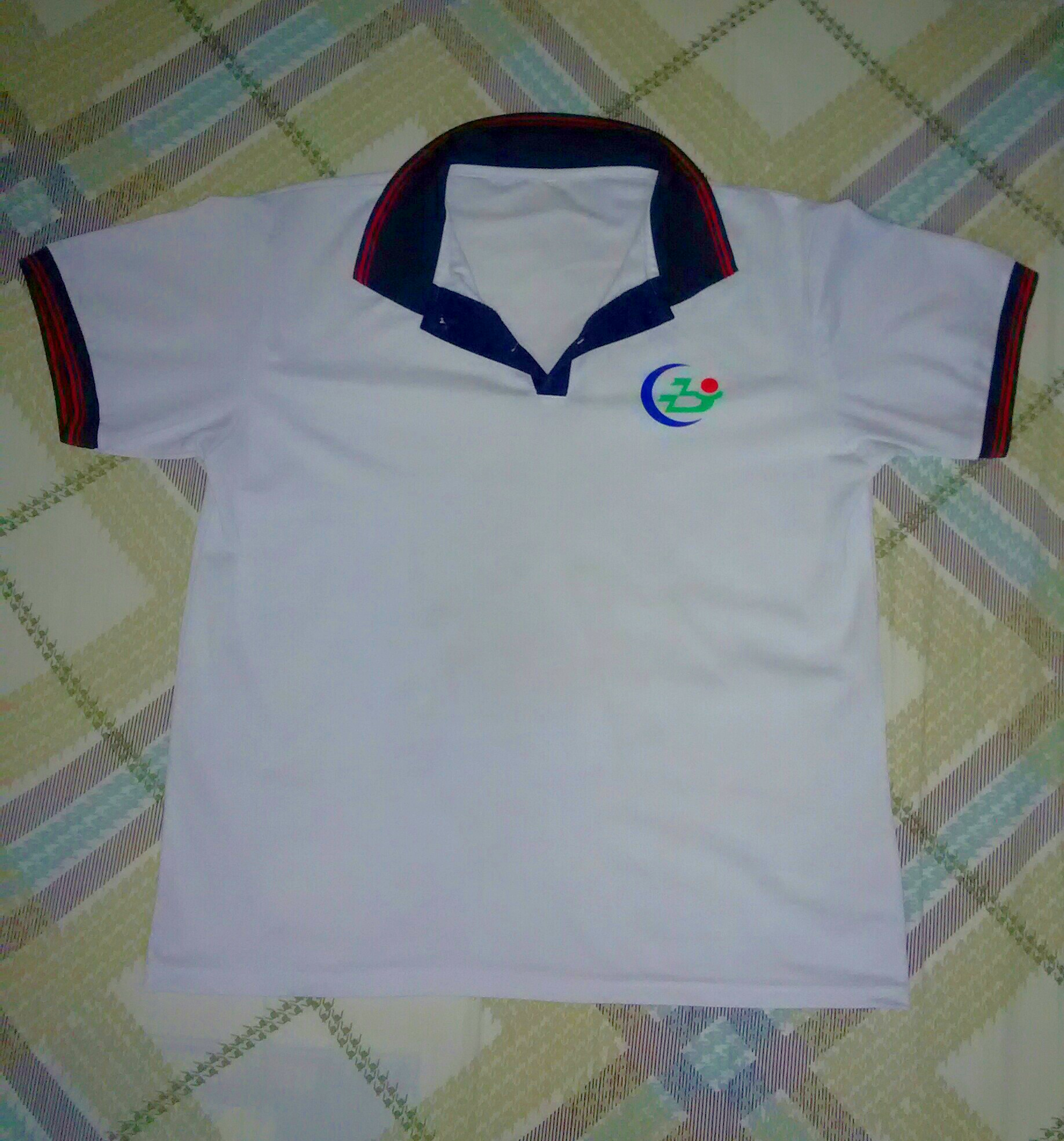 一件潮州市职业技术学校的夏季上衣校服（没有系纽扣）。